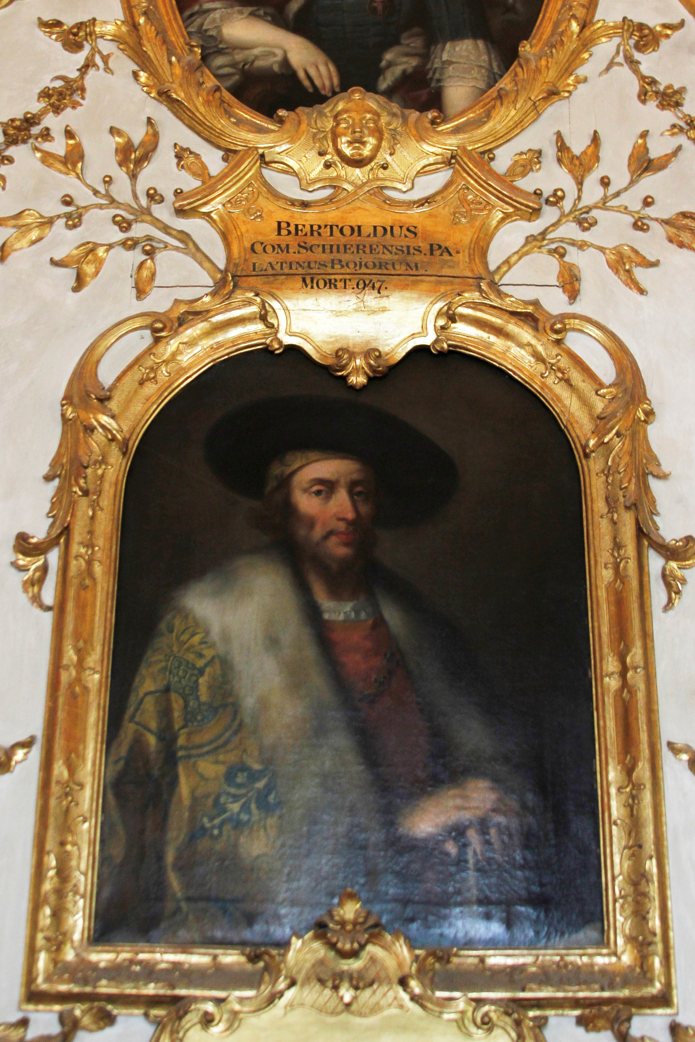 Ancestral Gallery - Residenz - Munich - Germany